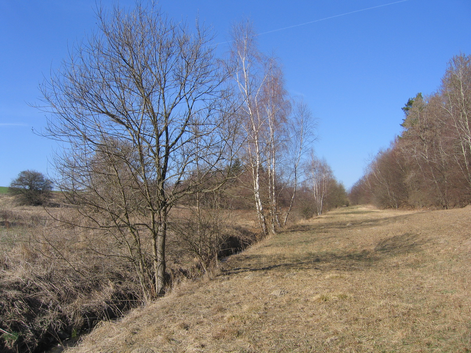 Napřímený tok Velká Haná.